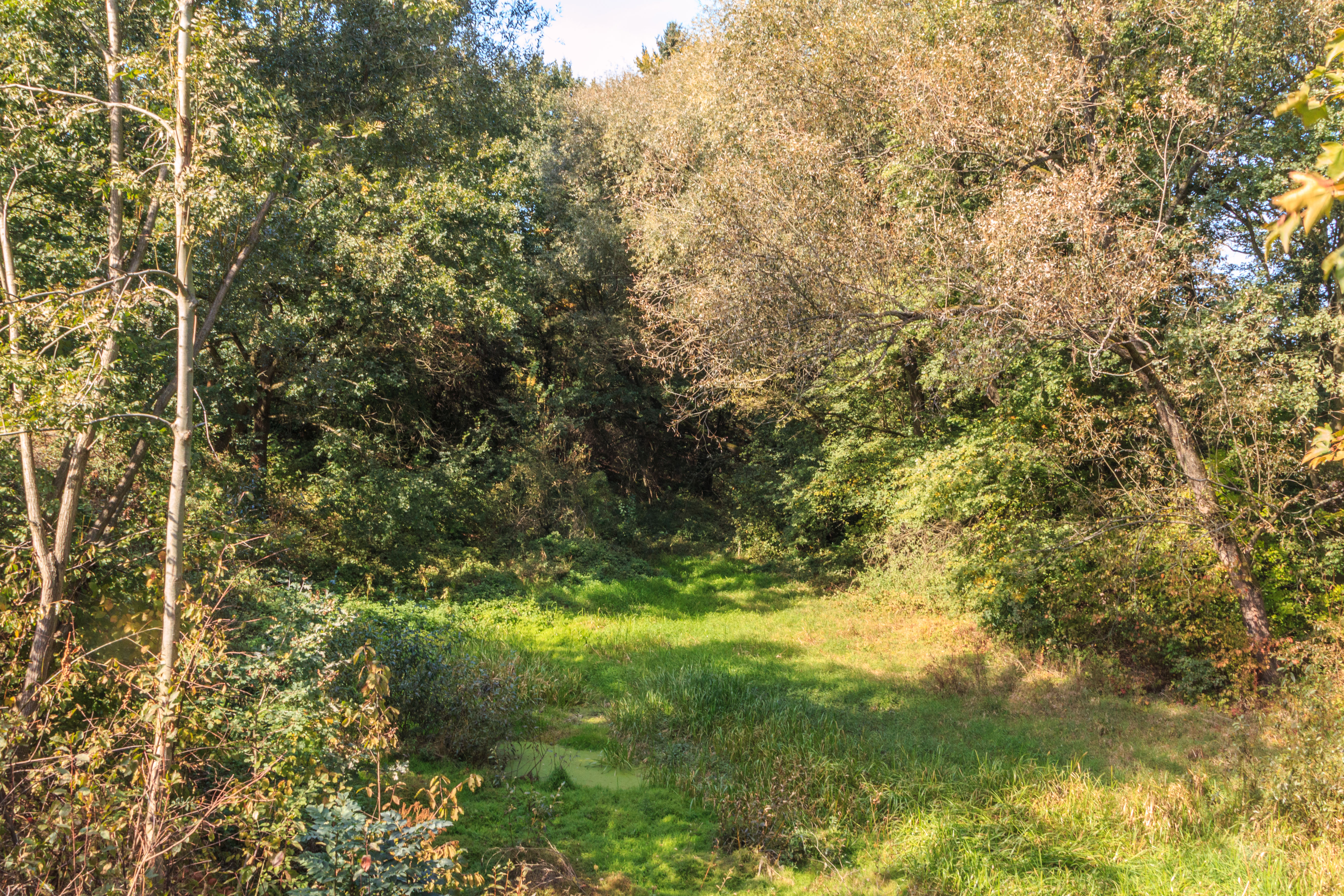 Mrtvé rameno Labe - Na Průhoně Project: Vodstvo